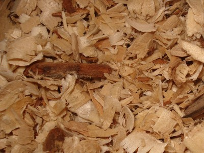 tremble